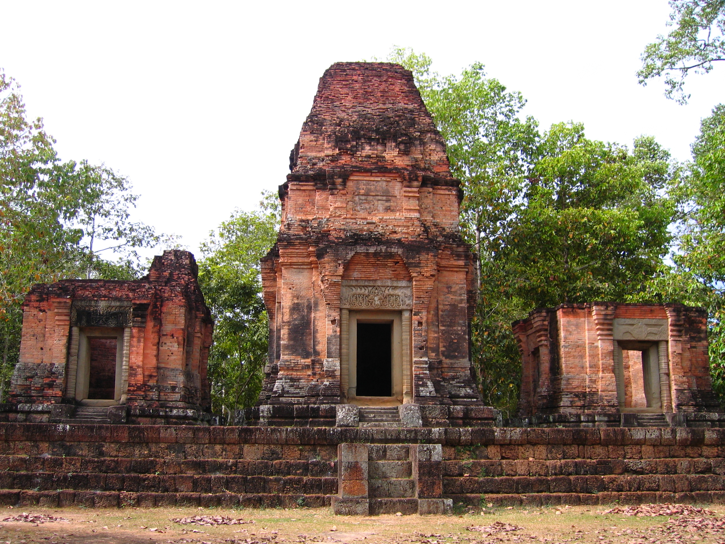 プラサット・バイ Prasat Bei 2008